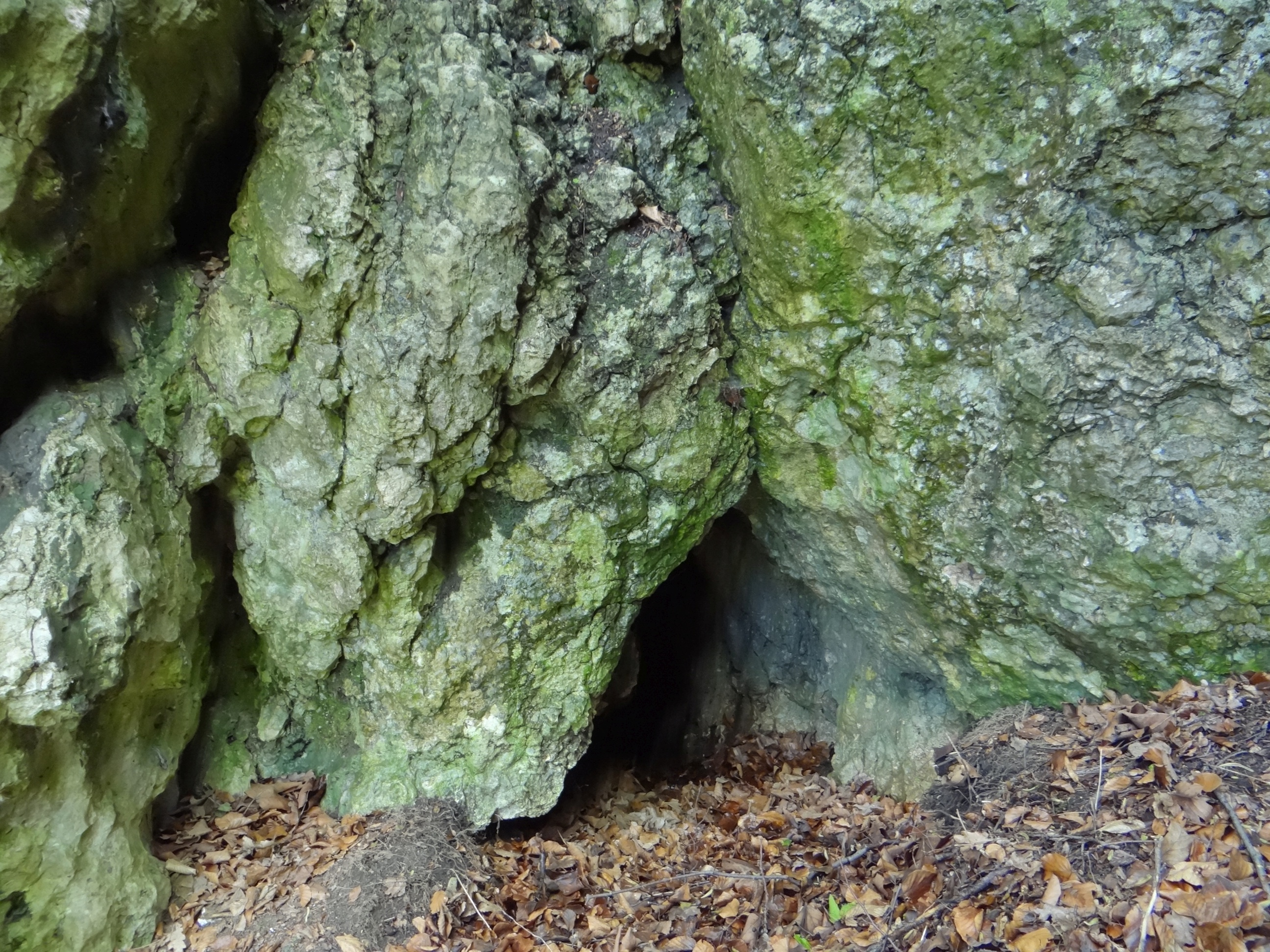 Schronisko Prawe